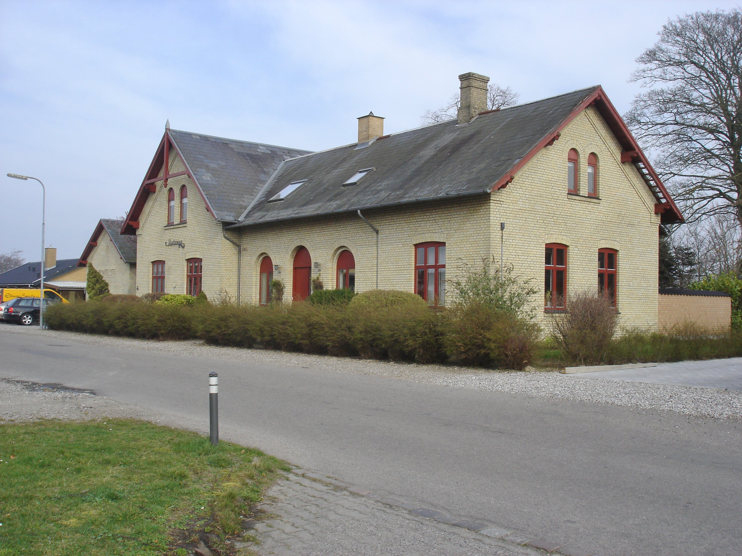 Refsvindinge Station, vejsiden fra V